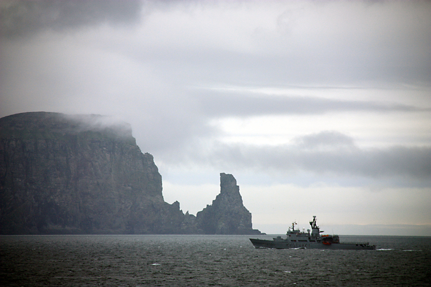 Südspitze der Bäreninsel (Bjørnøya), gesehen von Westen, mit einem Schiff der norwegischen Küstenwacht.